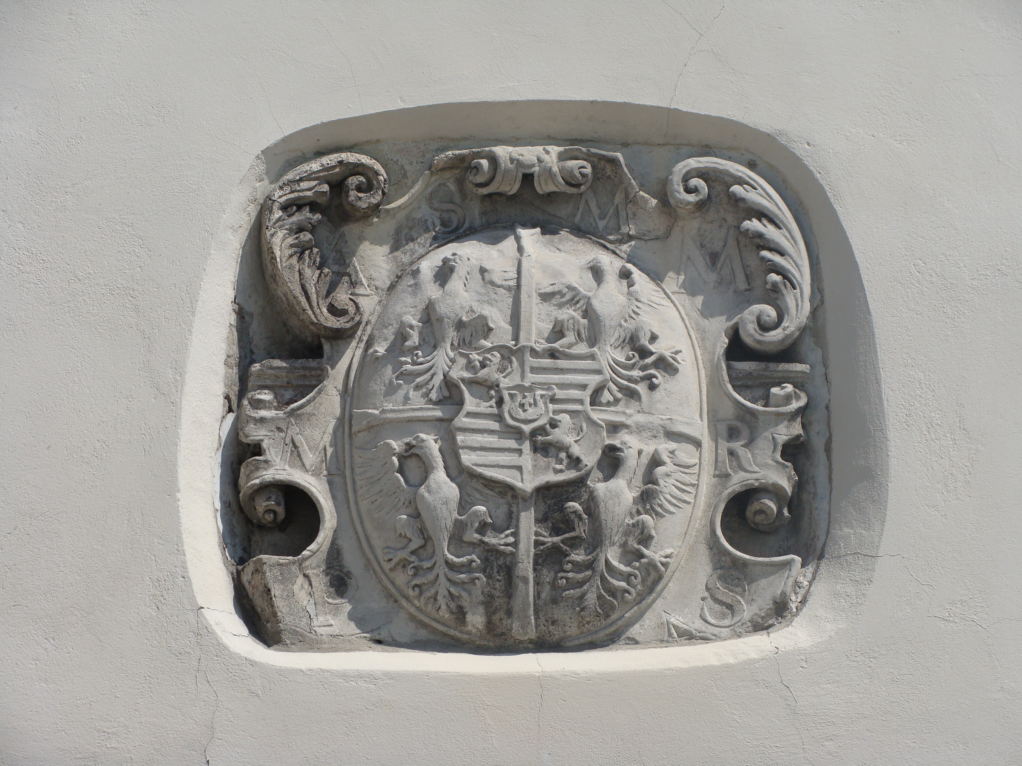 Herb Myszkowscy Pińczów